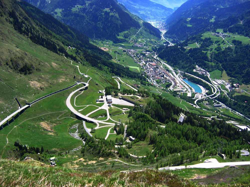 Fotografie der Gotthard-Südrampe, eigenes Bild, copyright: GNU FDL